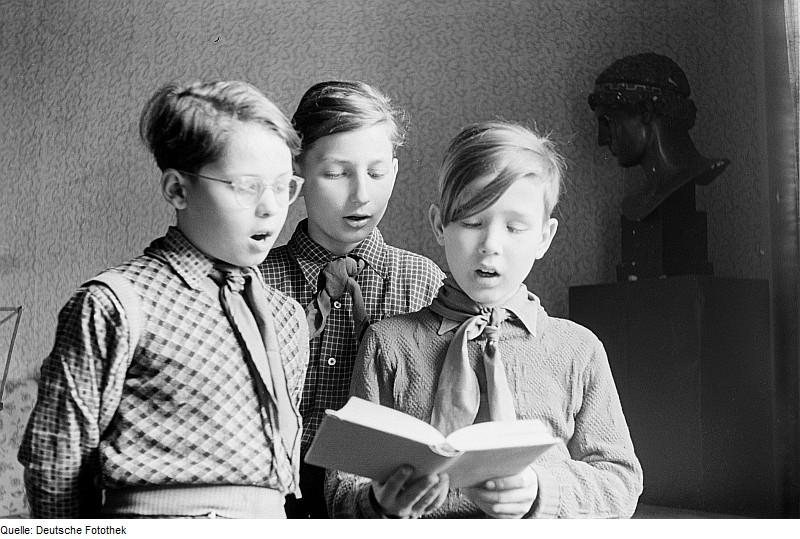 Original image description from the Deutsche Fotothek Portrait dreier Pioniere beim Singen